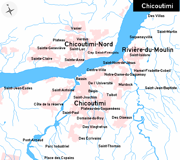 Carte des quartiers de Chicoutimi